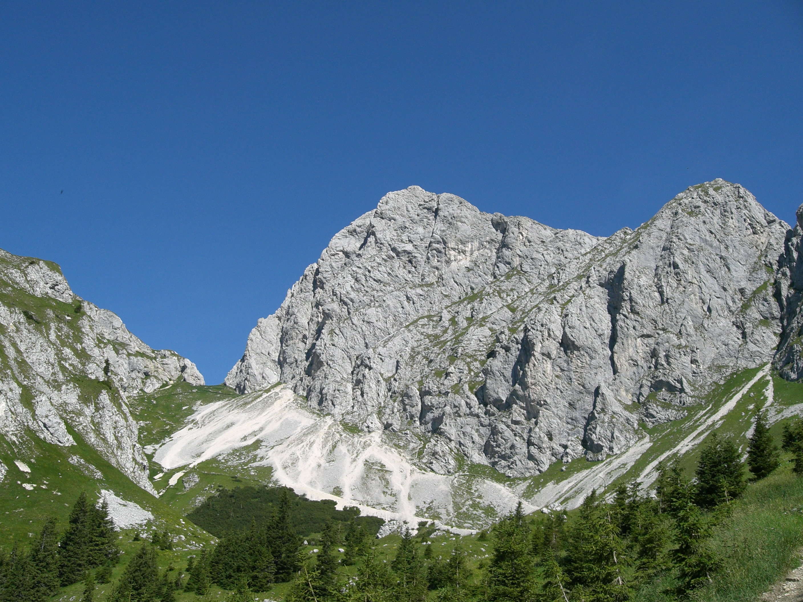 Südostblick auf die Gimpel und die Judenscharte.